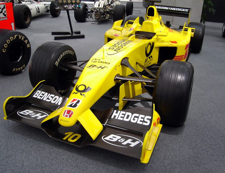 Jordan EJ12 (2002, #10 Takuma Sato)